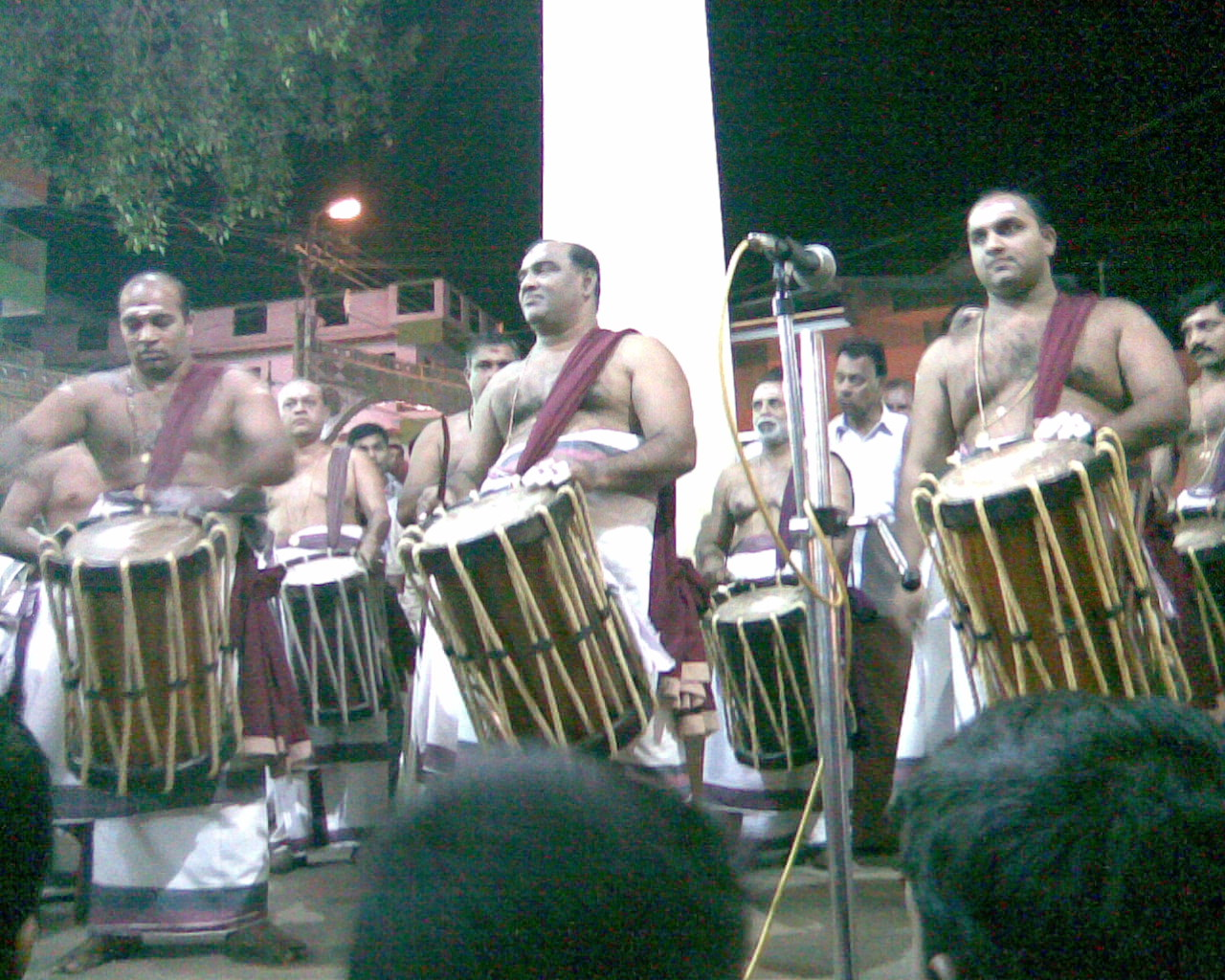 പത്മശ്രീ ബഹുമതി ലഭിച്ചതിനുശേഷം ആദ്യം നടന്ന ട്രിപ്പിള്‍ തായമ്പകയില്‍നിന്ന് (കുട്ടങ്ങുളങ്ങര ക്ഷേത്രം,പൂങ്കുന്നം,തൃശ്ശൂര്‍)